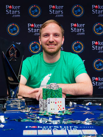 Mike Watson nach dem Gewinn des Main Events des PokerStars Caribbean Adventures auf den Bahamas